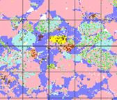 Grains de quartz en rose, calcite en violet, feldspath potassique en bleu ciel, oxydes en oranges/marron, micas en jaunes